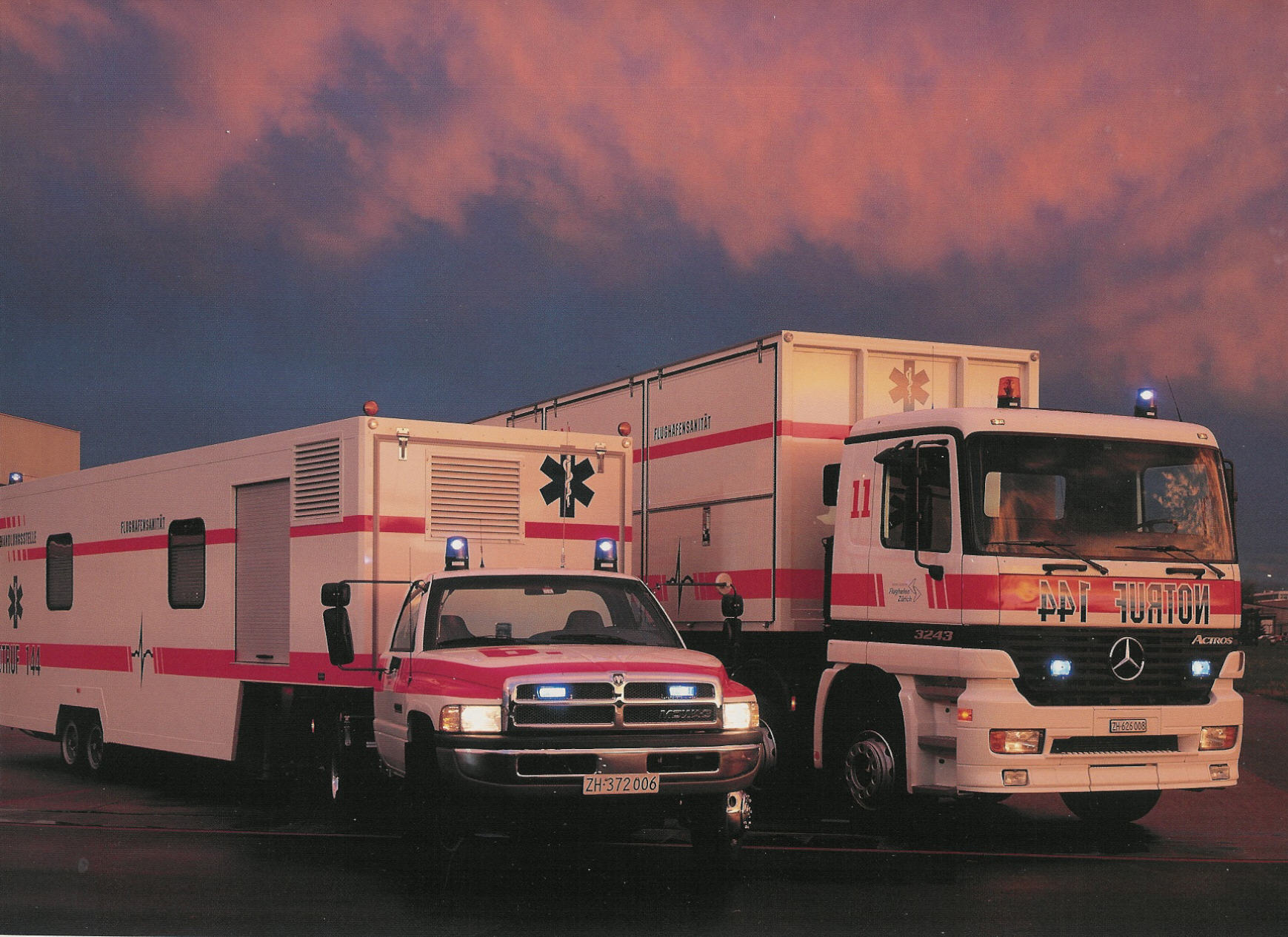 Beispiel von Einsatzfahrzeugen eines Rettungsdienstes für Großereignisse